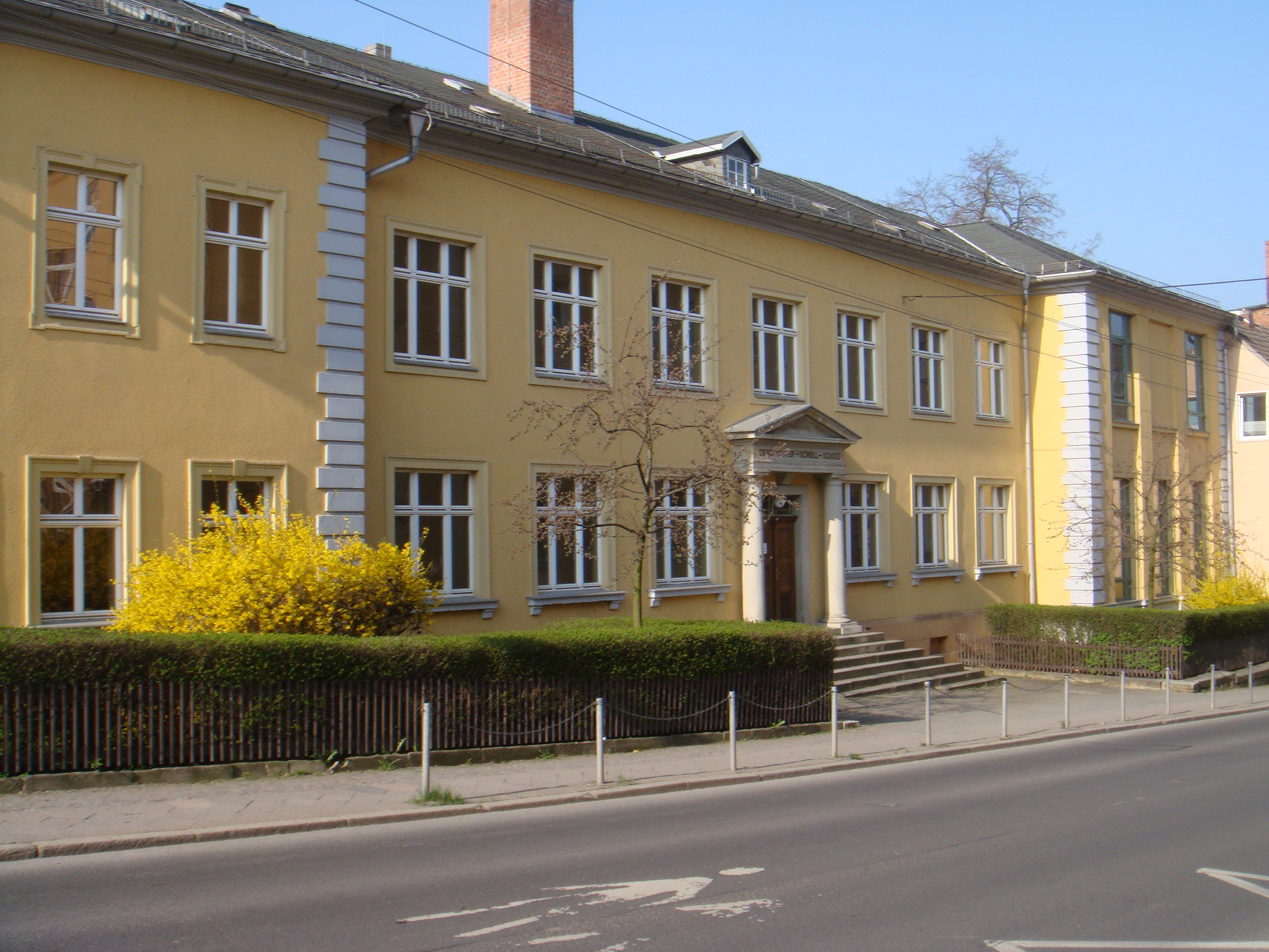 Geschwister-Scholl-Schule_Straßenseite